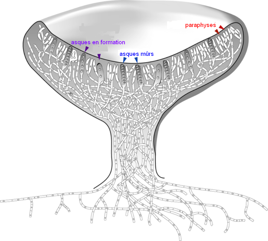 traduction de ascocarp.png